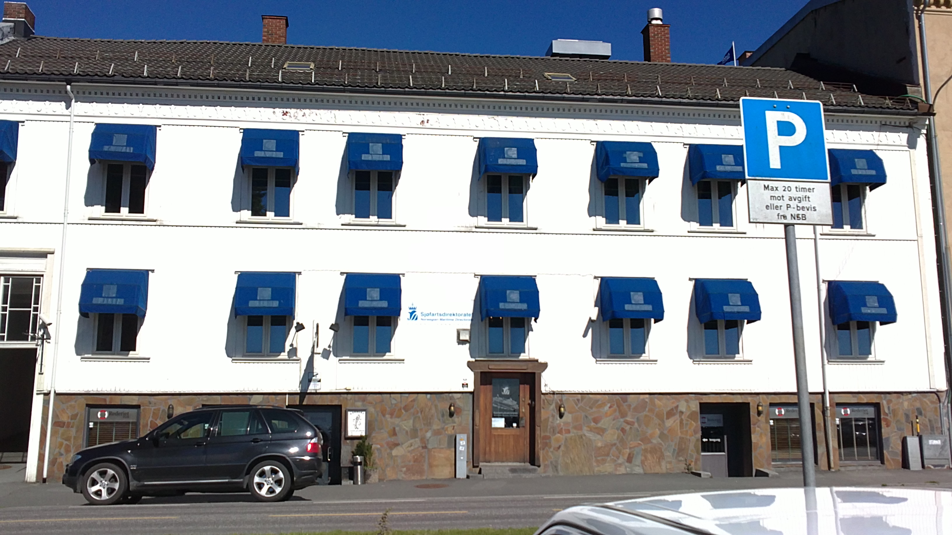 Bilde av Sjøfartsdirektoratets bygning i Larvik